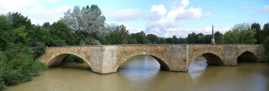 Ulrichsbruecke am Neckar zwischen Köngen und Wendlingen